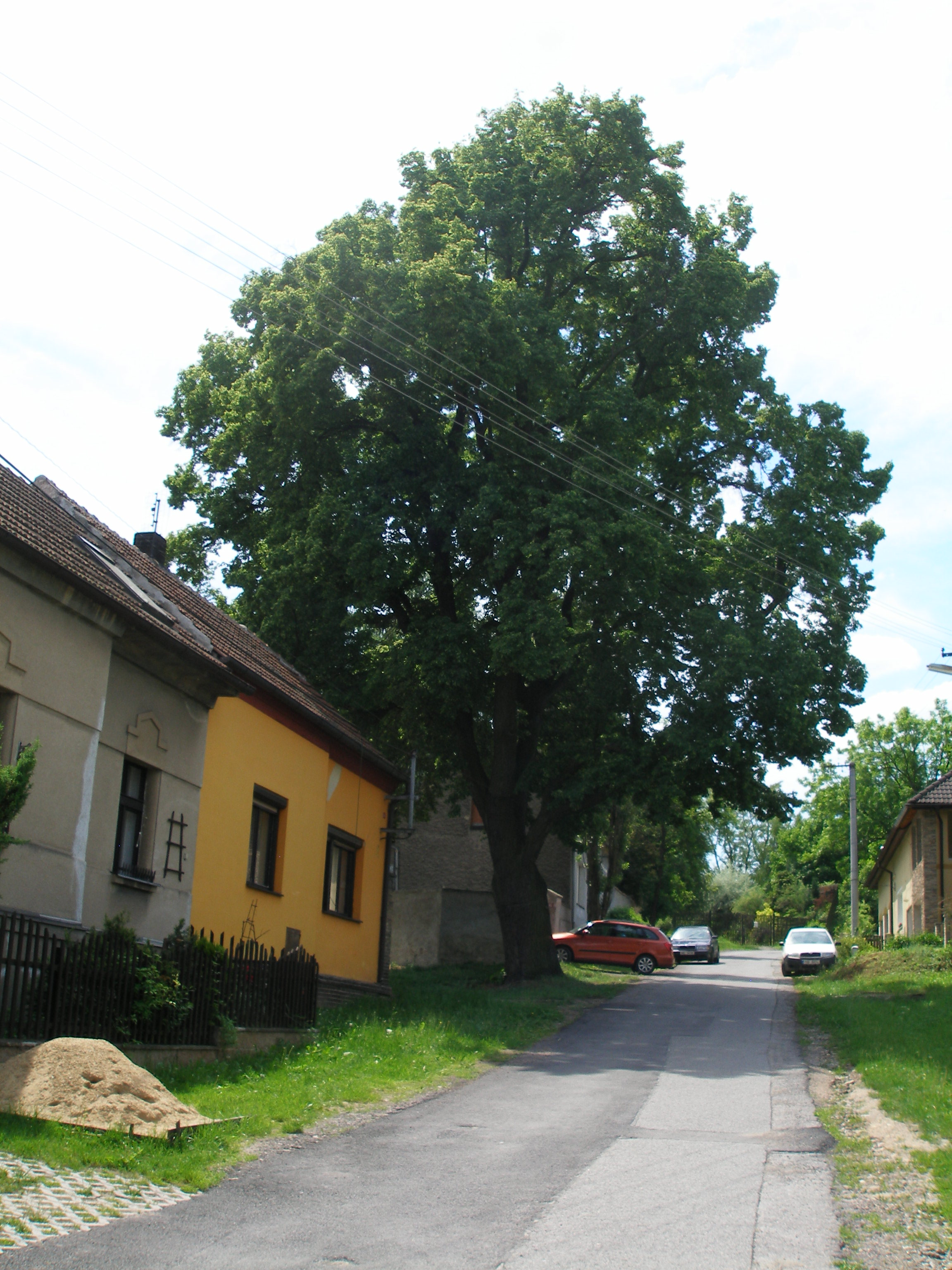 Památná lípa u čp. 114 v Podlešíně.